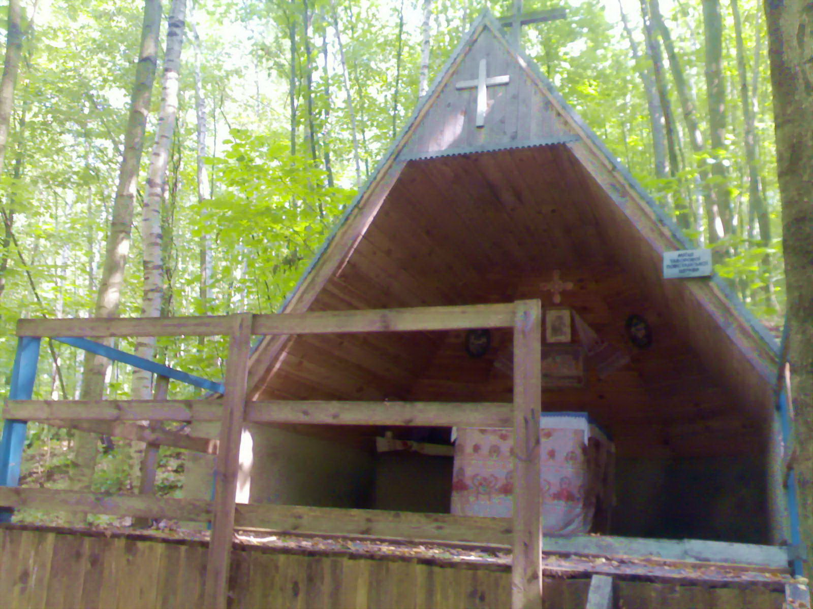 Місце таборової повстанської церкви.